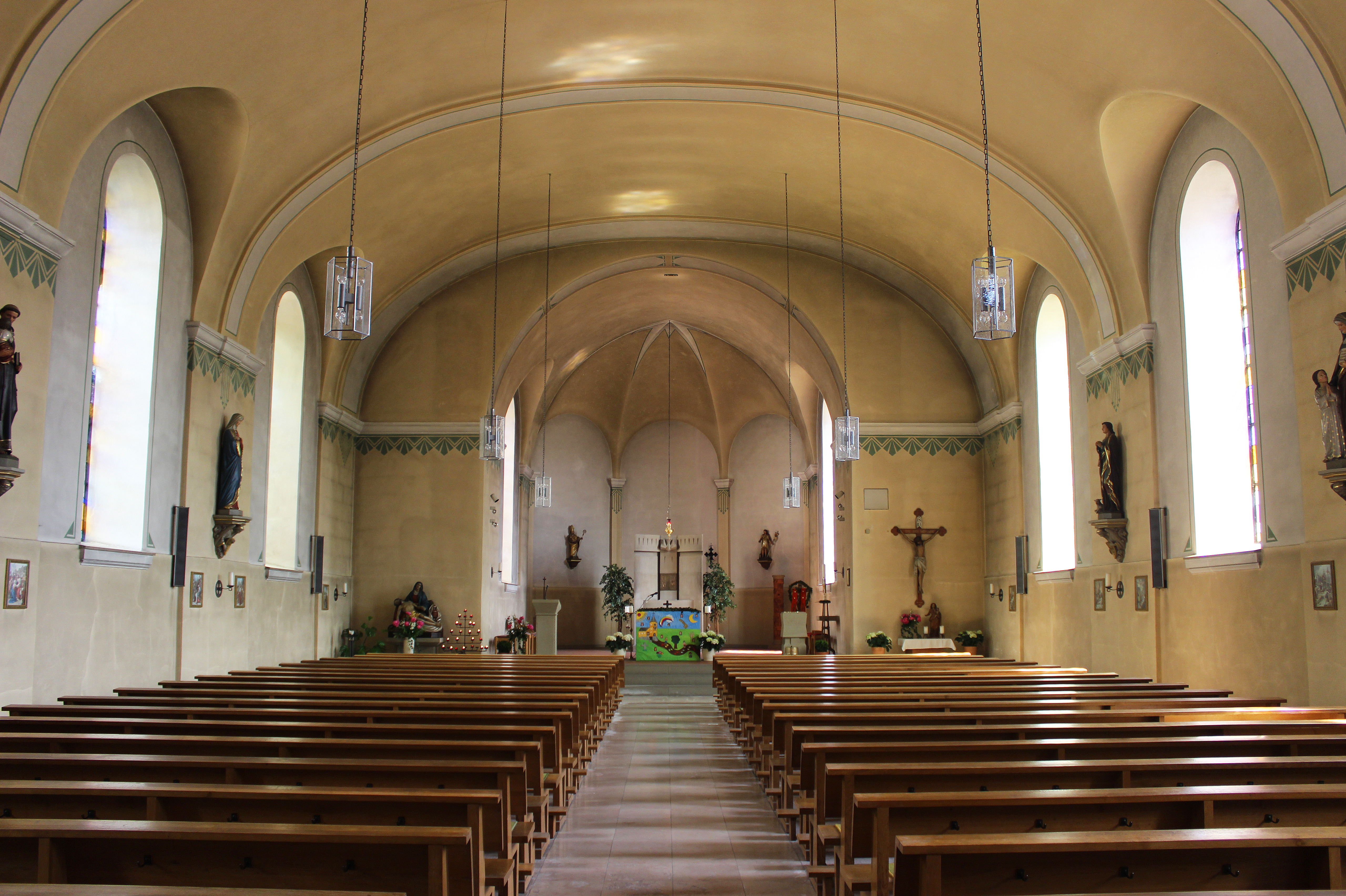 Blick ins Innere der katholischen Pfarrkirche St. Johannes der Täufer in Mondorf, einem Stadtteil von Merzig, Landkreis Merzig-Wadern, Saarland